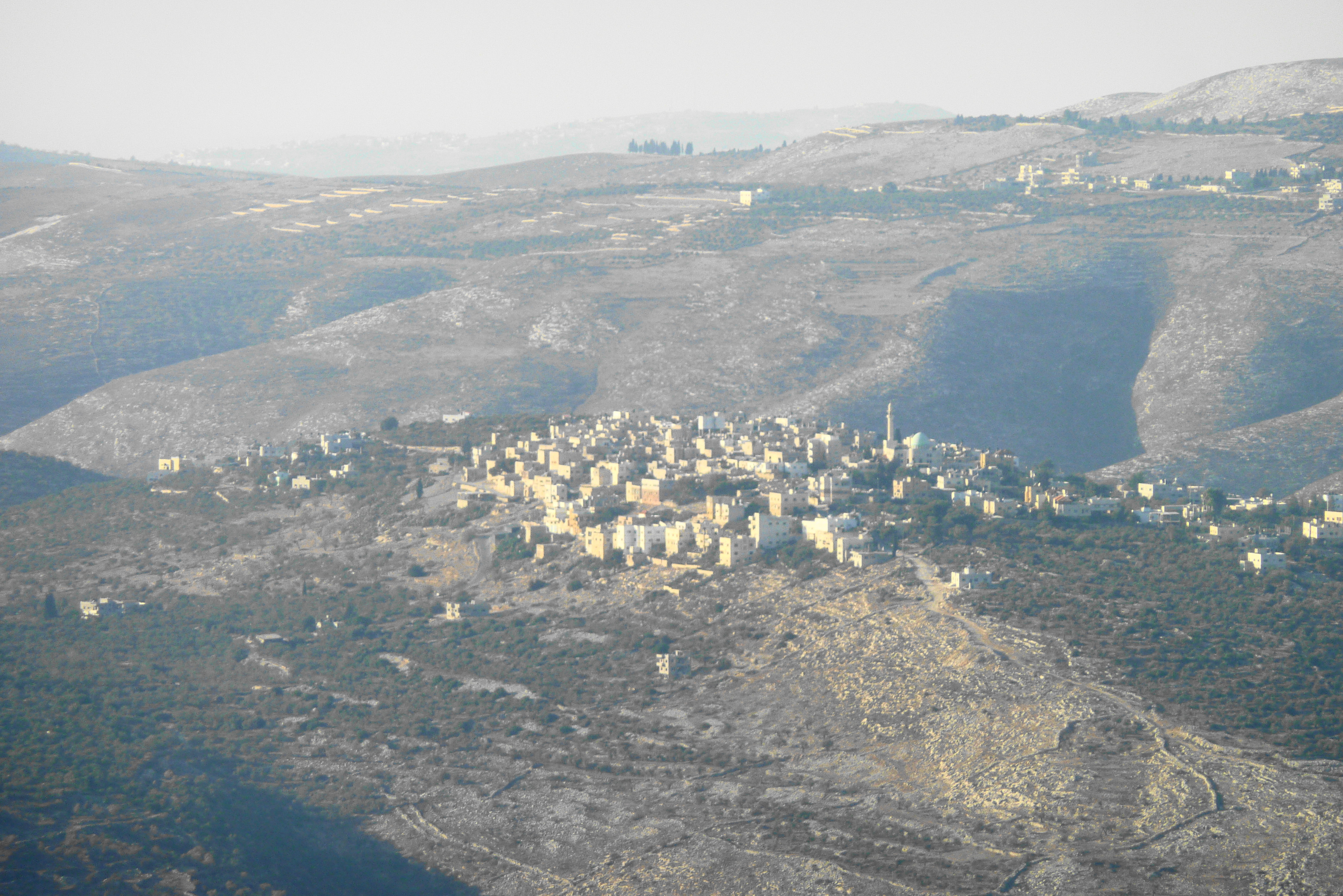 Yasid